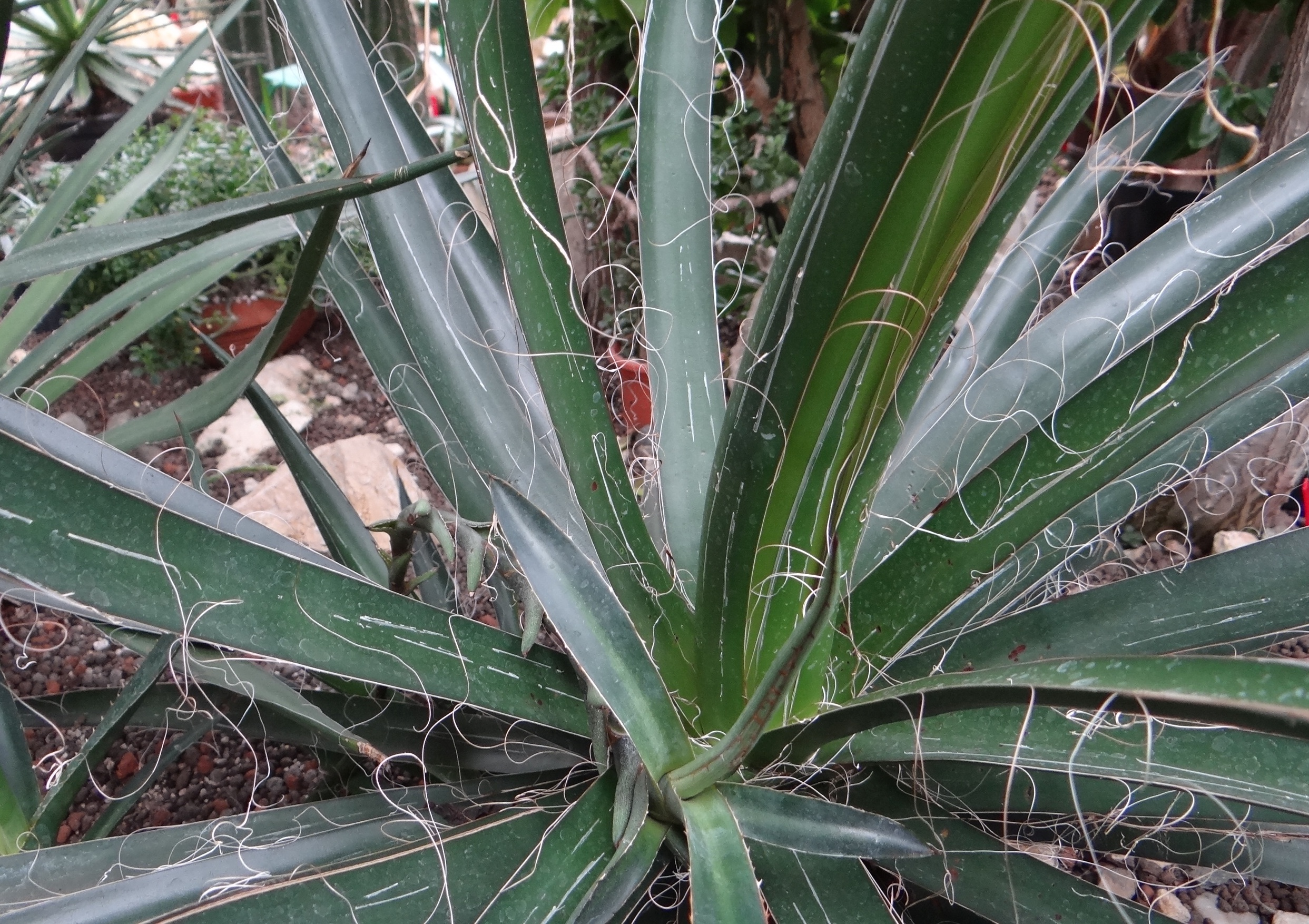 Agave filifera. Location: Poland, Botanical Garden, Łódź